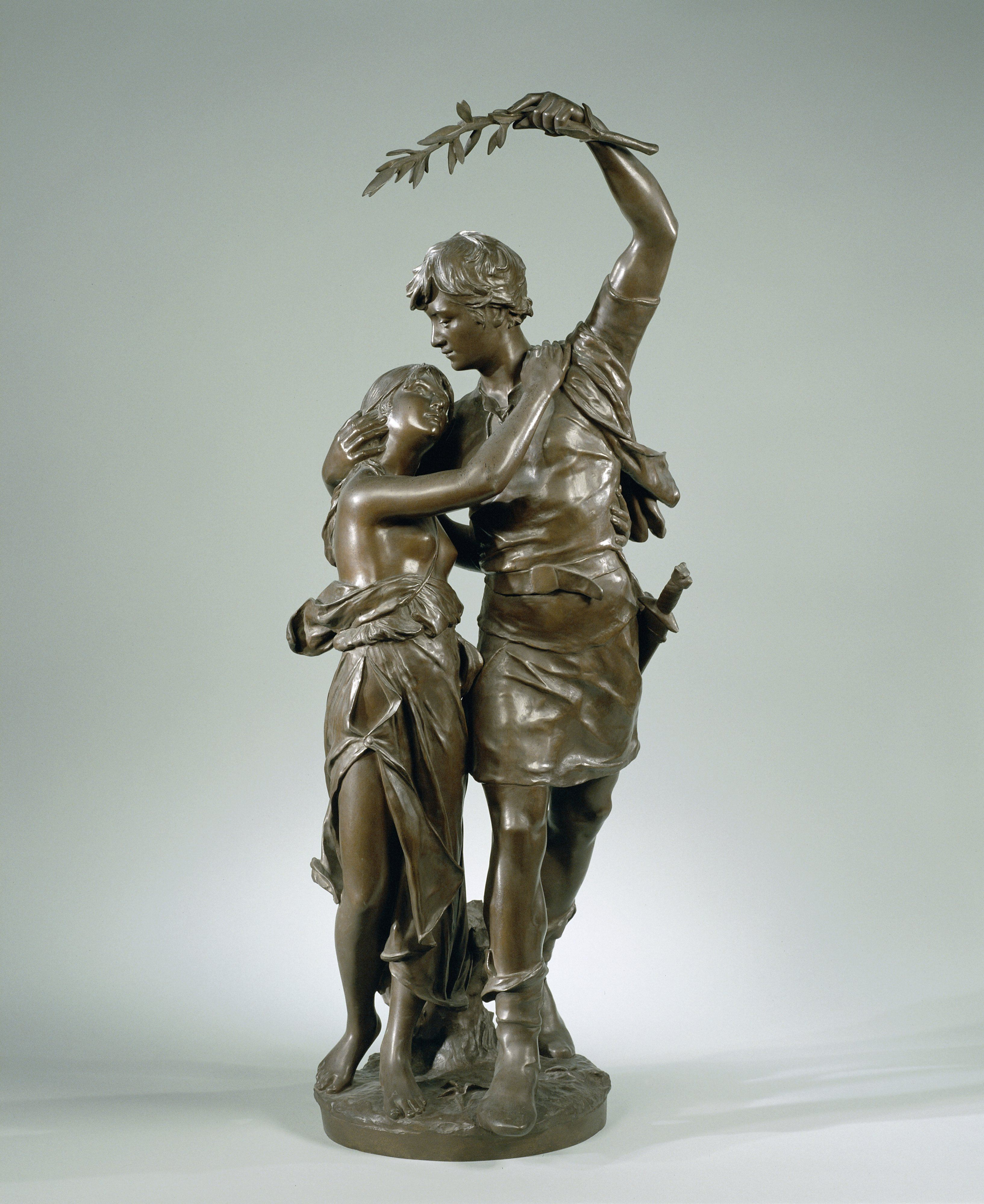 IdentificatieTitel(s): 'Le retour du vainqueur'Objecttype: beeldhouwwerk Objectnummer: BK-B-95VervaardigingVervaardiger: beeldhouwer: Eugène MariotonDatering: ca. 1850 - ca. 1950Materiaal: brons Afmetingen: h 91,5 cm. × b 40 cm. × d 36 cm. × g 42 kgVerwerving en rechtenCredit line: Schenking van mevrouw R.A. Hoekstra Benedictusz-van GeunsVerwerving: schenking jun-1909Copyright: Publiek domein